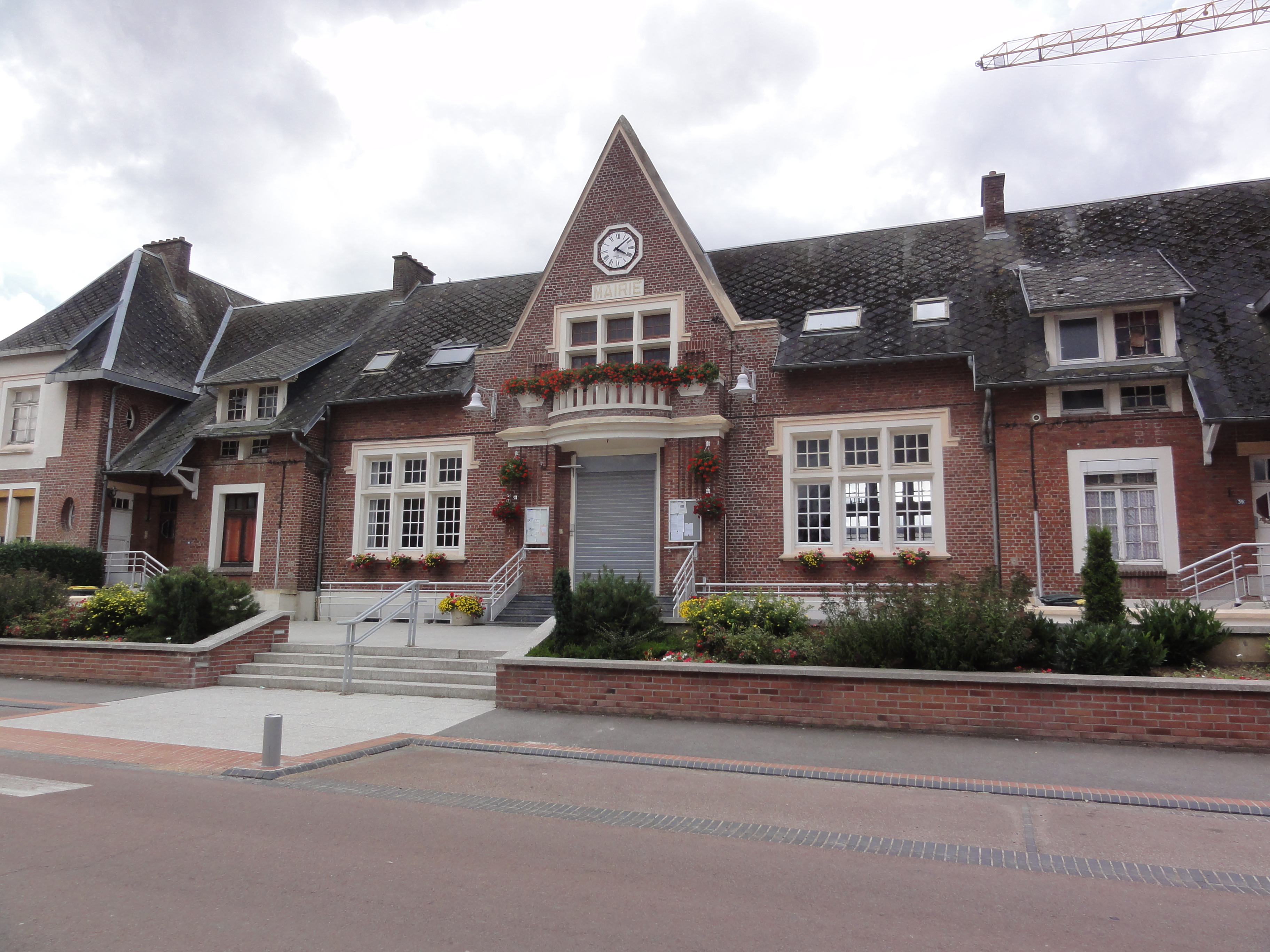 Étreillers (Aisne) mairie